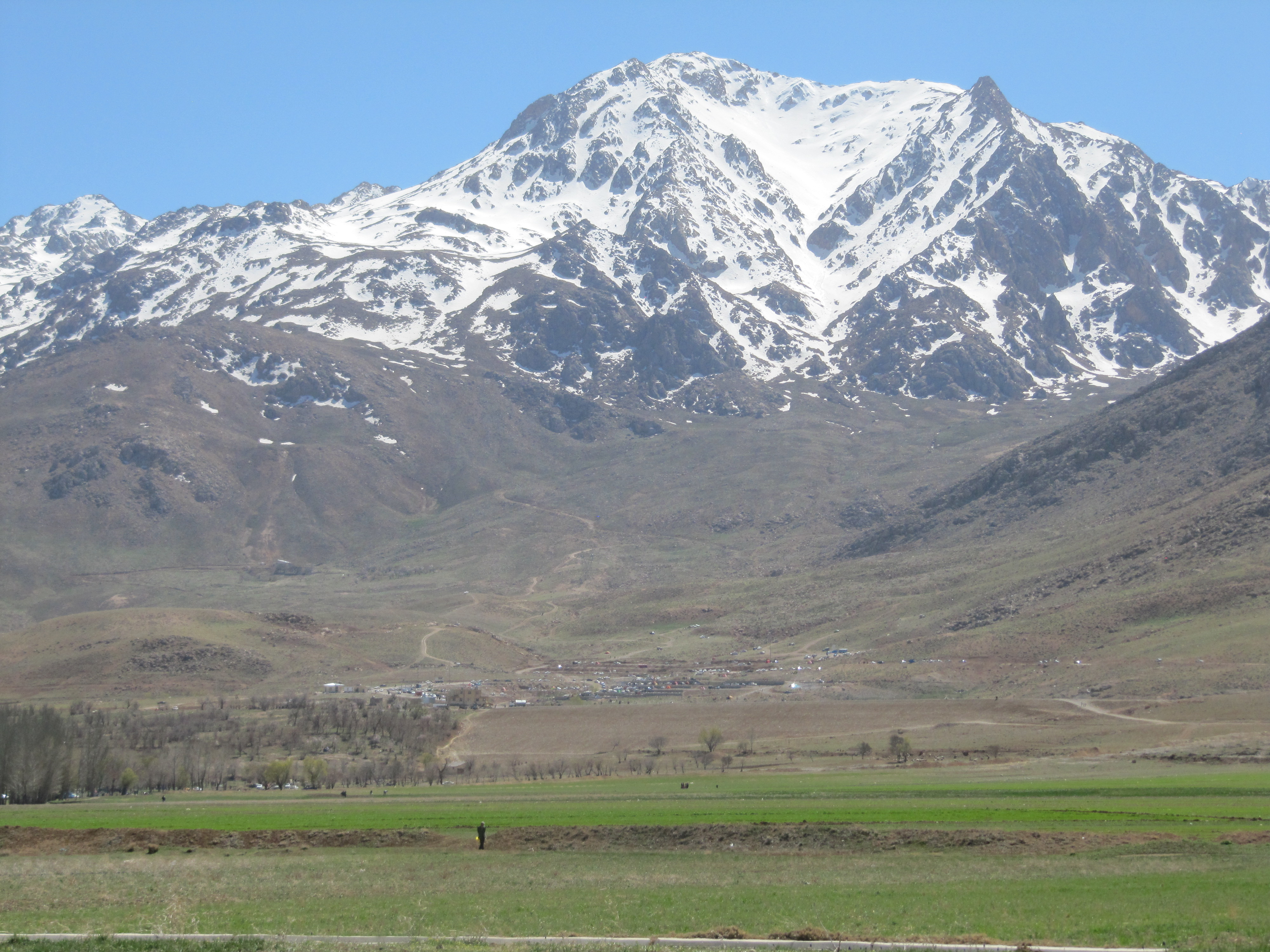 نمایی از کوه جهان بین شهر هفشجان